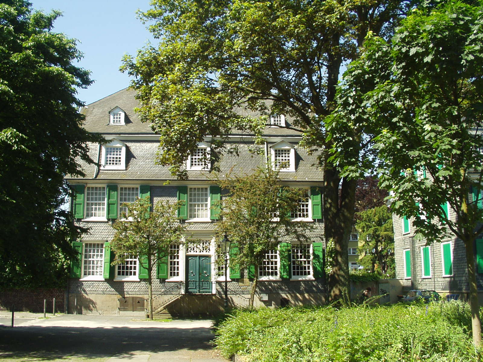 Engelshaus. An der Friedrich-Engels-Allee in Barmen gelegen. Dient heute als Teil des Museums für Frühindustrialisierung. Eigenes Bild. Aufgenommen 28.05.2005. Urheber: manos